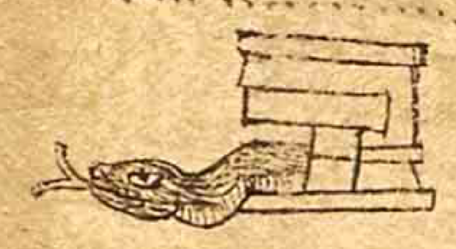 Imagen tomada la lámina 10 del Códice Xolotl donde aparece el topónimo.